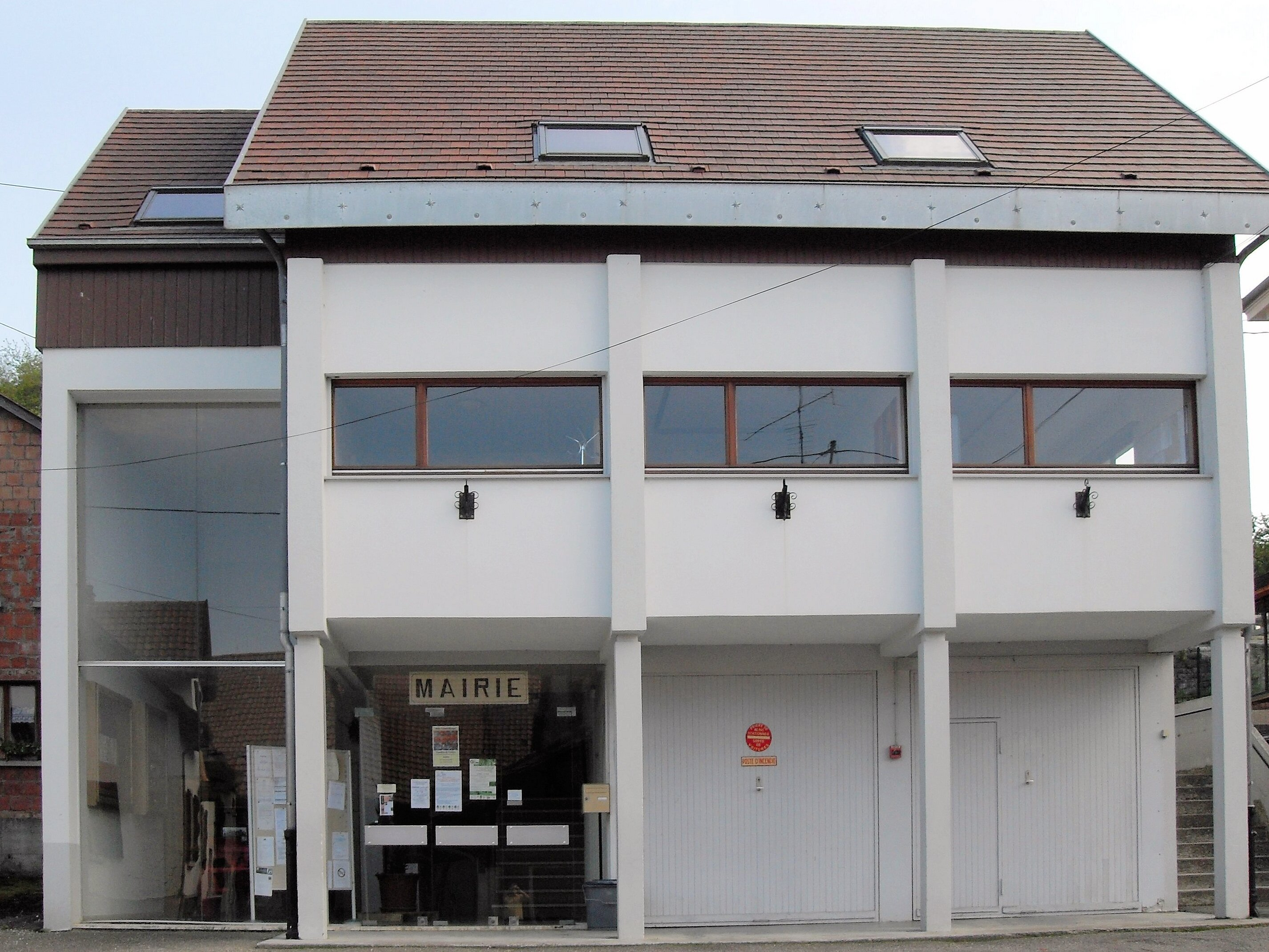 La mairie de Winkel